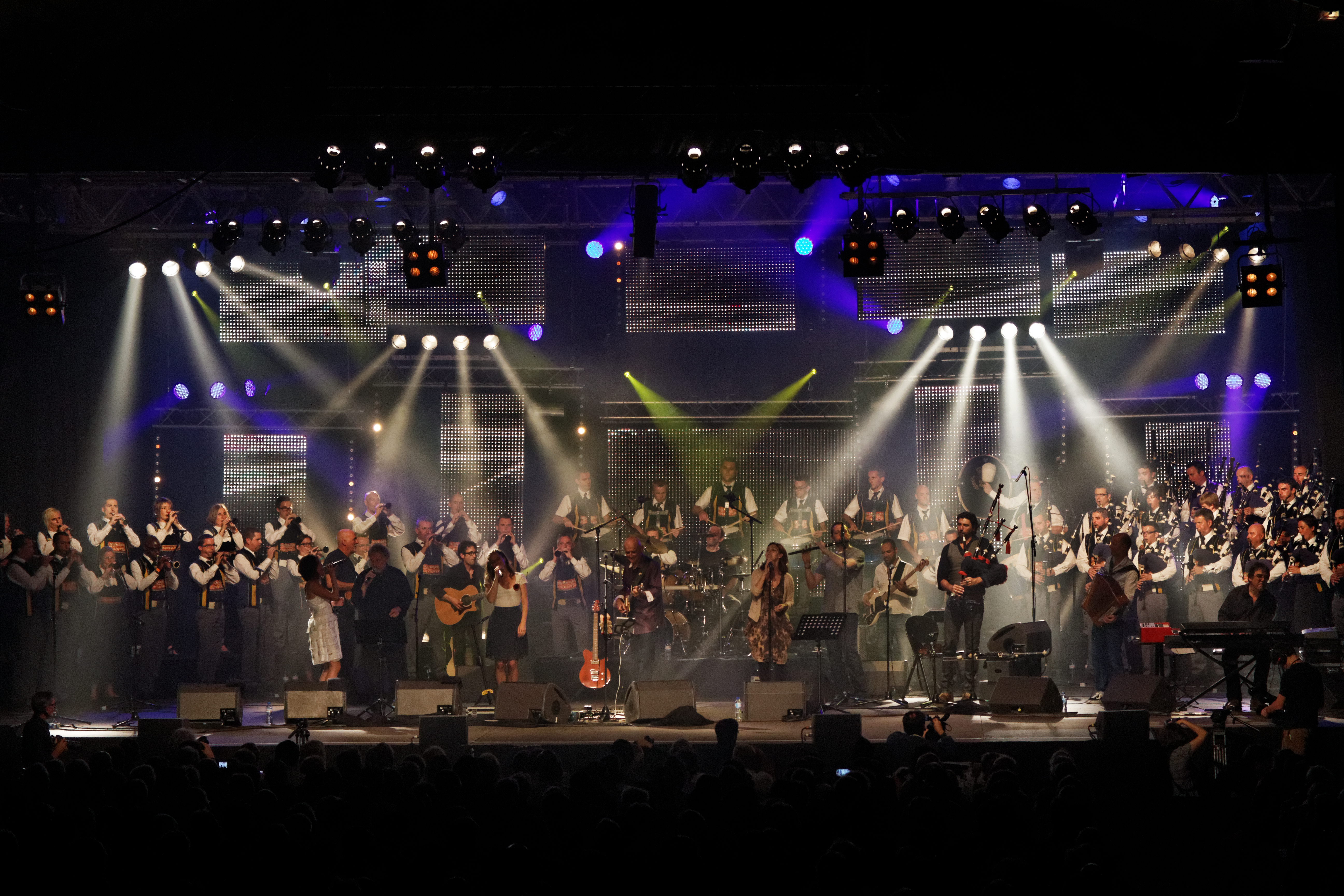 Dan ar Braz en concert sur la scène Gradlon lors du festival de Cornouaille 2013.